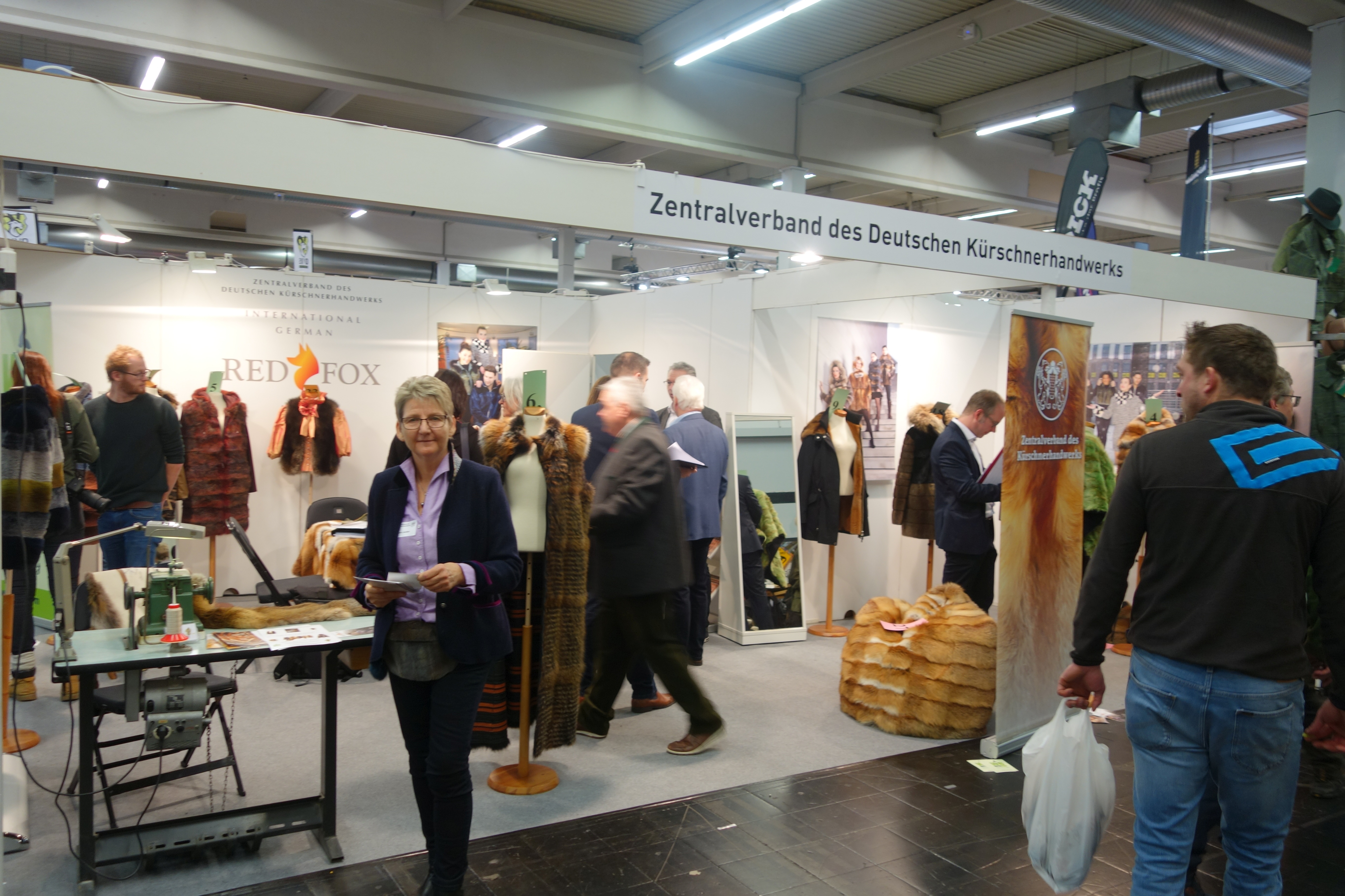 International German Red Fox Award 2020. Am Stand: Kürschnemeisterin Barbara Janßen, Güterloh. Anlässlich der Messe „Jagd & Hund“ 2020, Dortmund, Westfalenhalle.